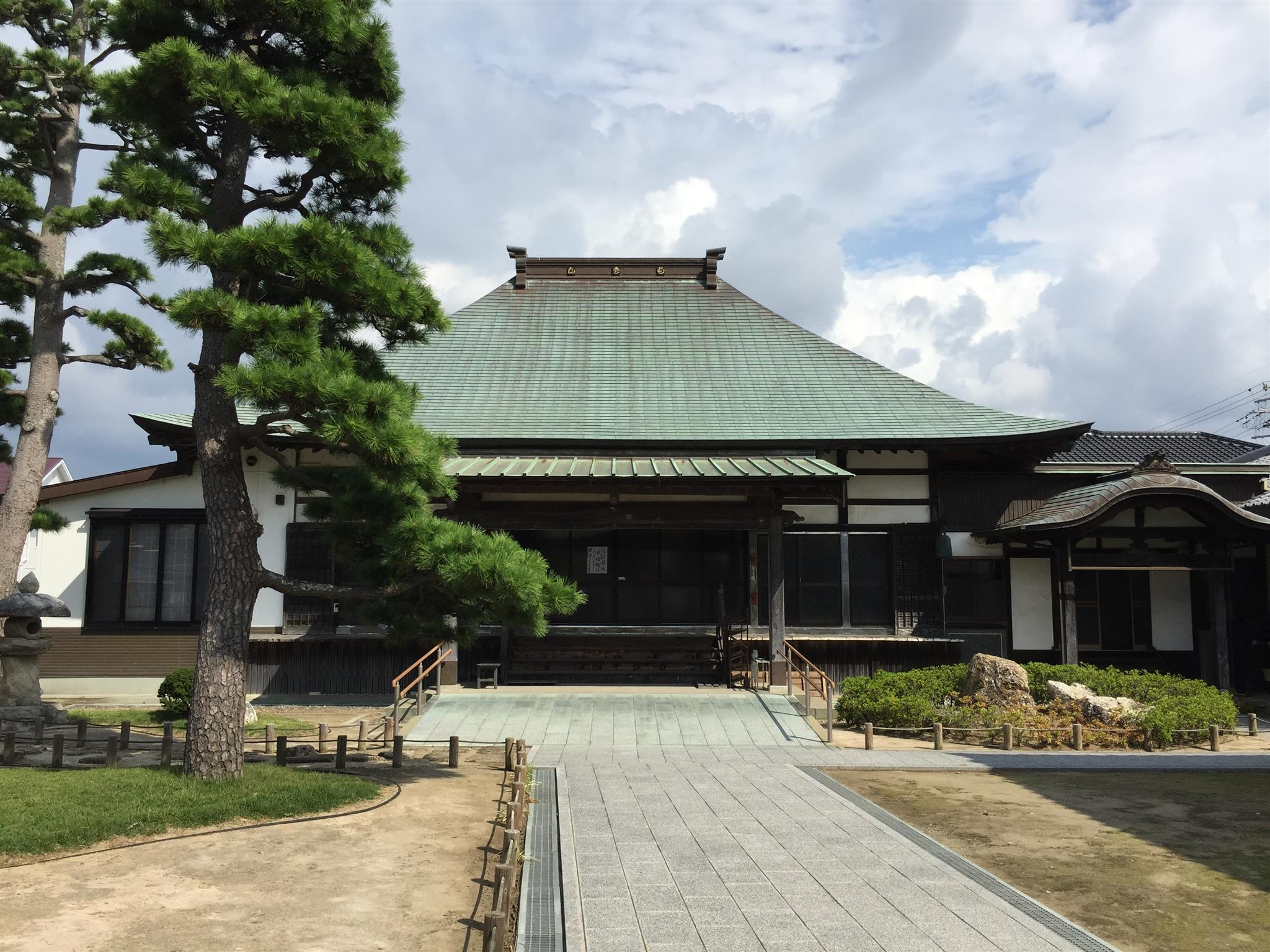 冨春院外観